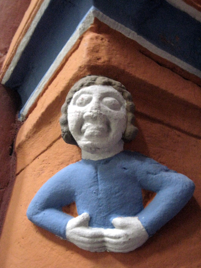 Kirche Geiß-Nidda, Kapitell Rundpfeiler/Süd